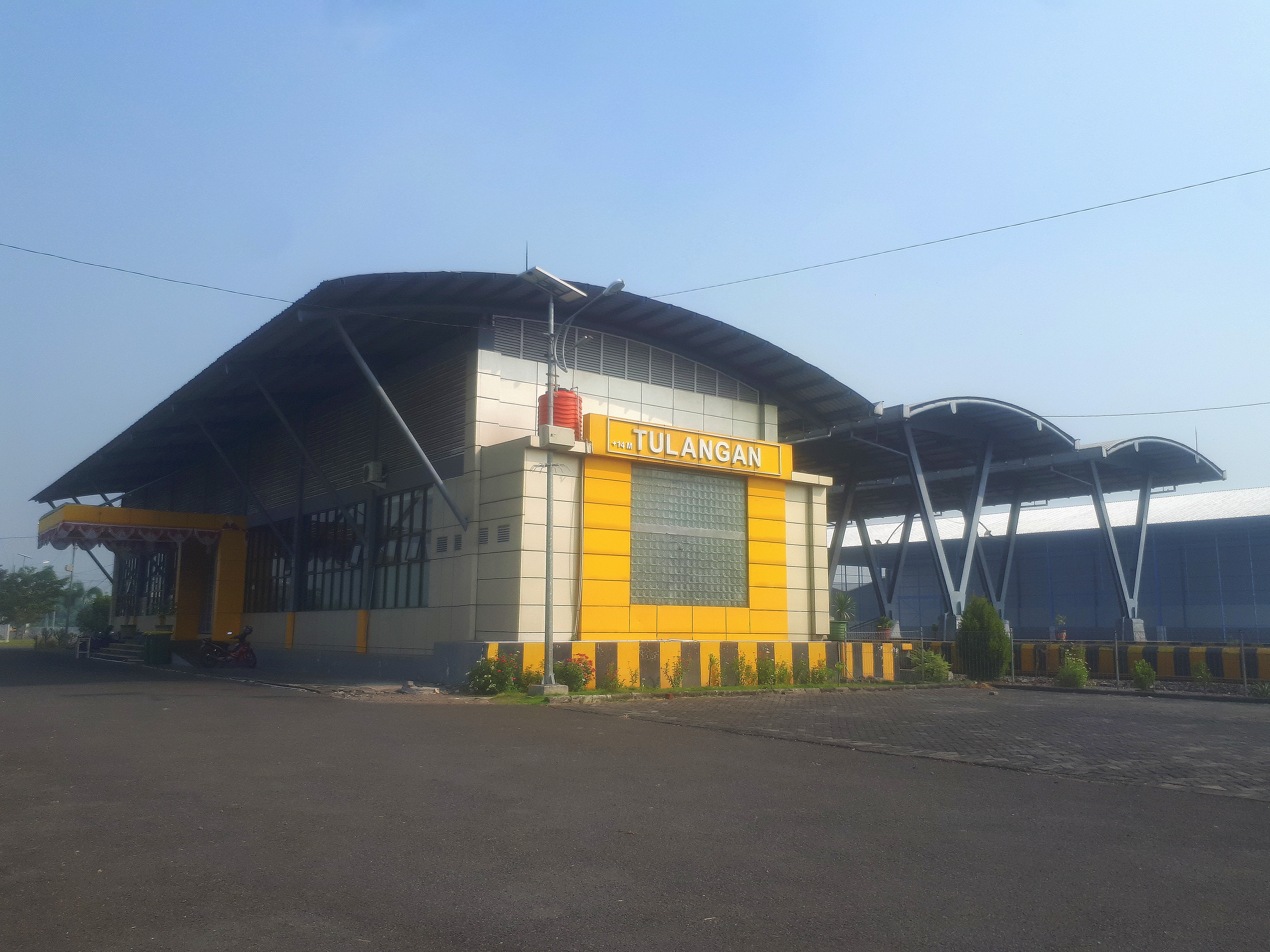 Tampak luar Stasiun Tulangan Tampak yang terletak di Kabupaten Sidoarjo, 2020